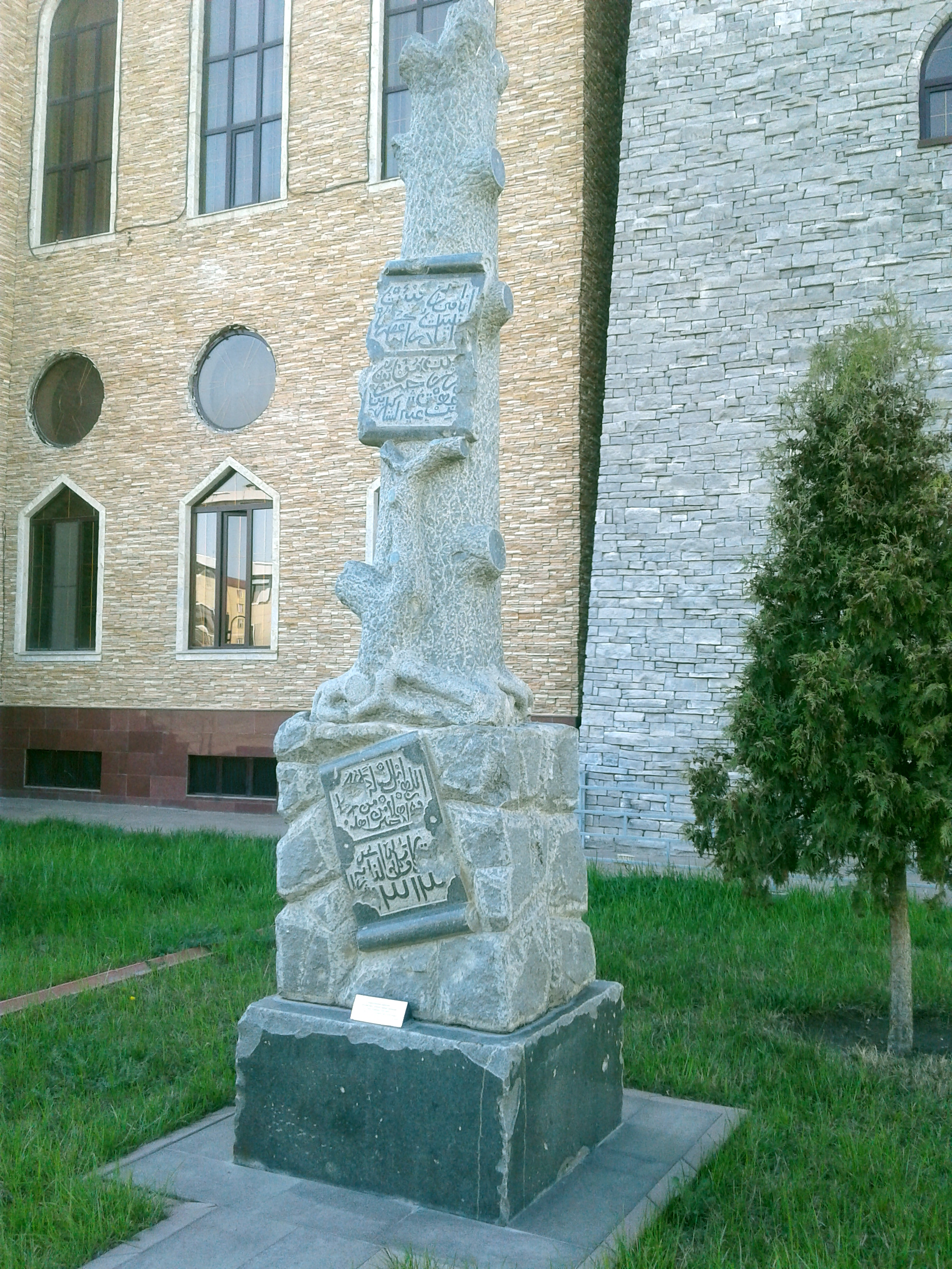 Надмогильный памятник генерал-майора милиции Российской империи Орцу Чермоева